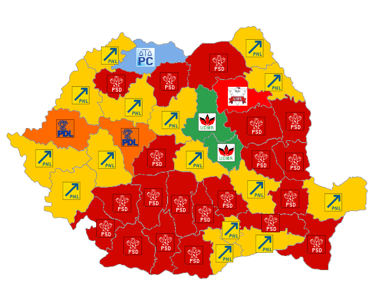 Apartenenţa politică a preşedinţilor de consilii judeţene